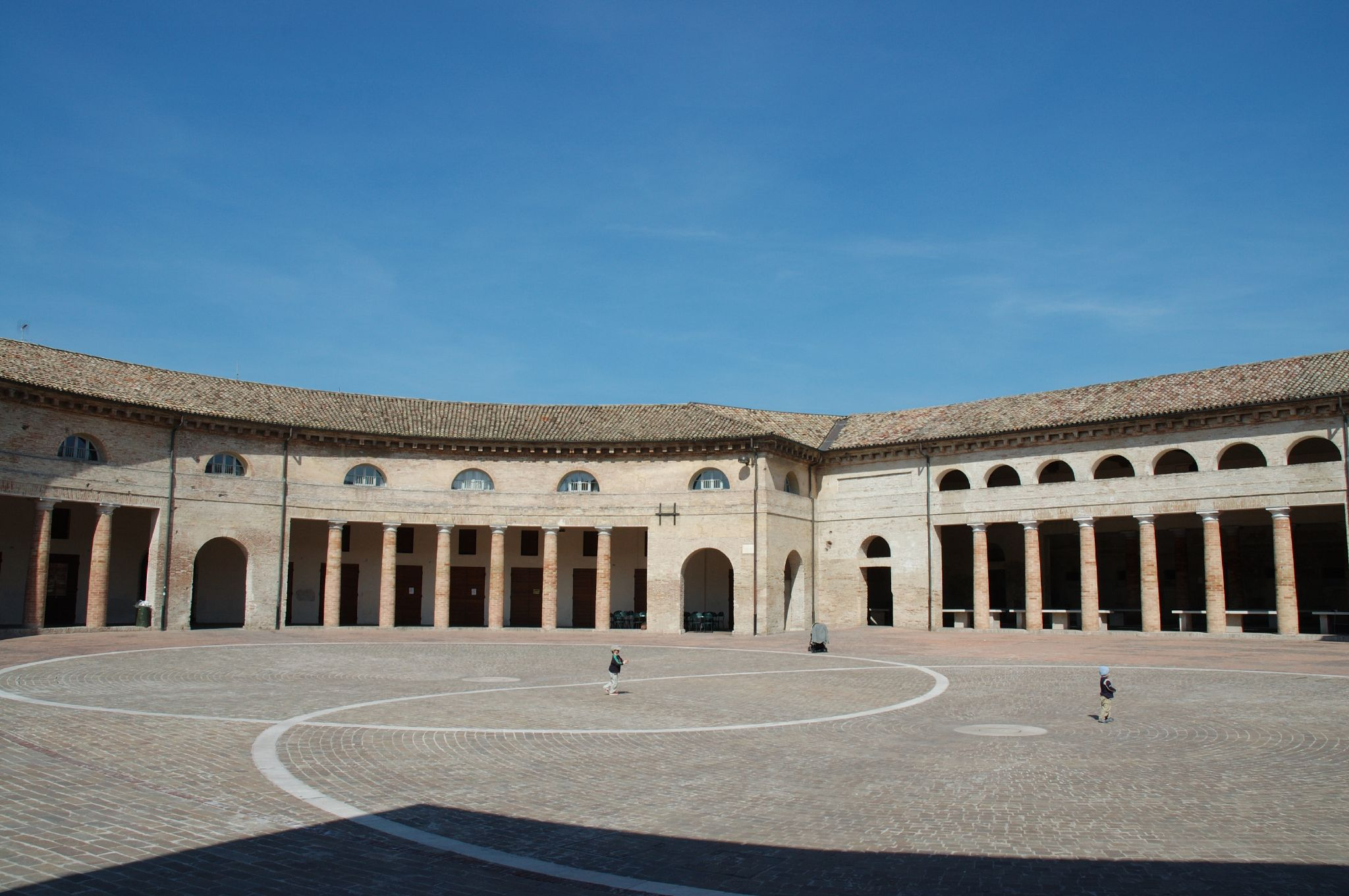 Foro Annonario a Senigallia, Marche, Italia